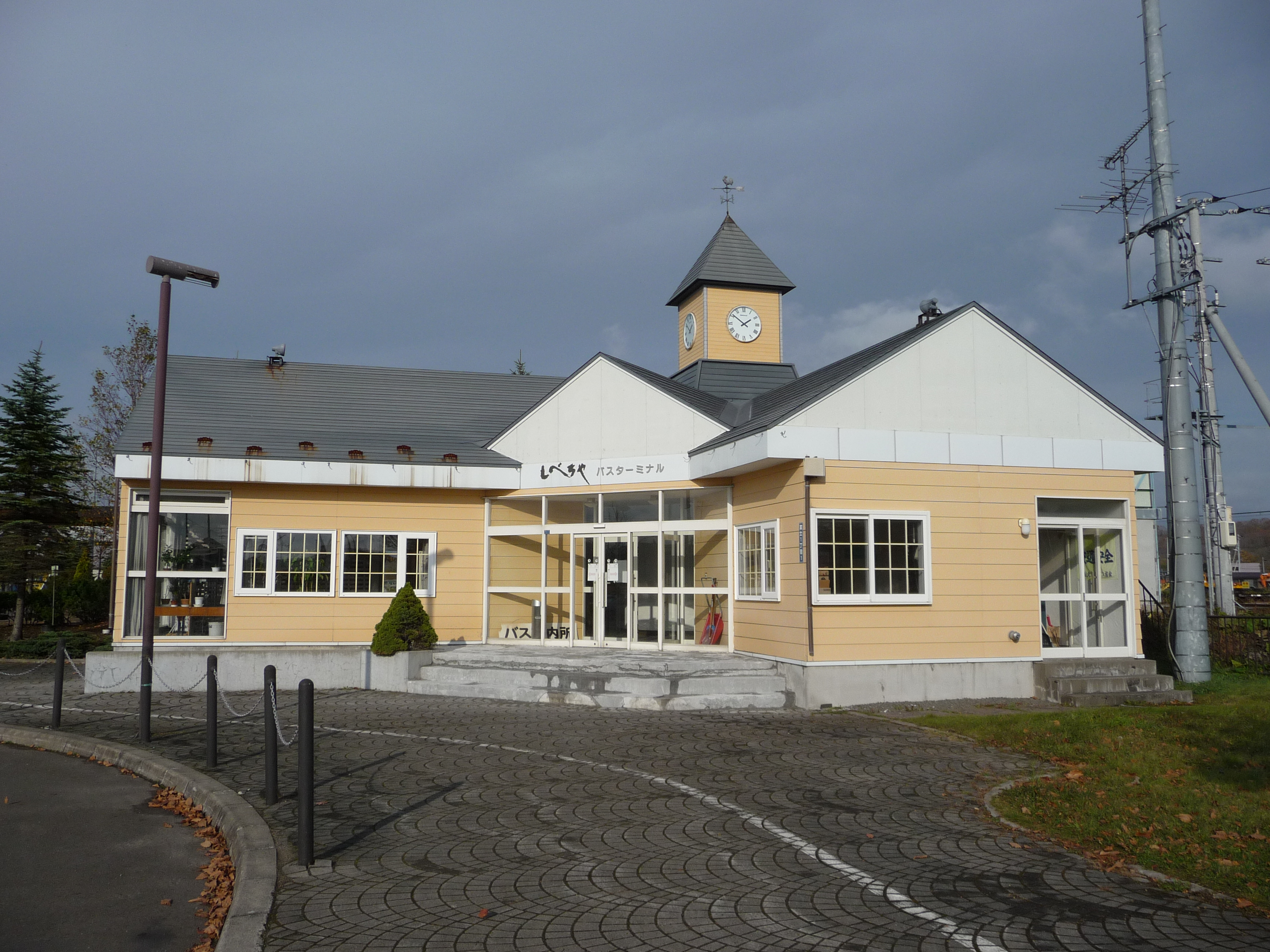 阿寒バスの標茶案内所（標茶町標茶駅前）